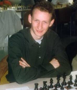 Harmen Jonkman (Original text: Harmen Jonkman)